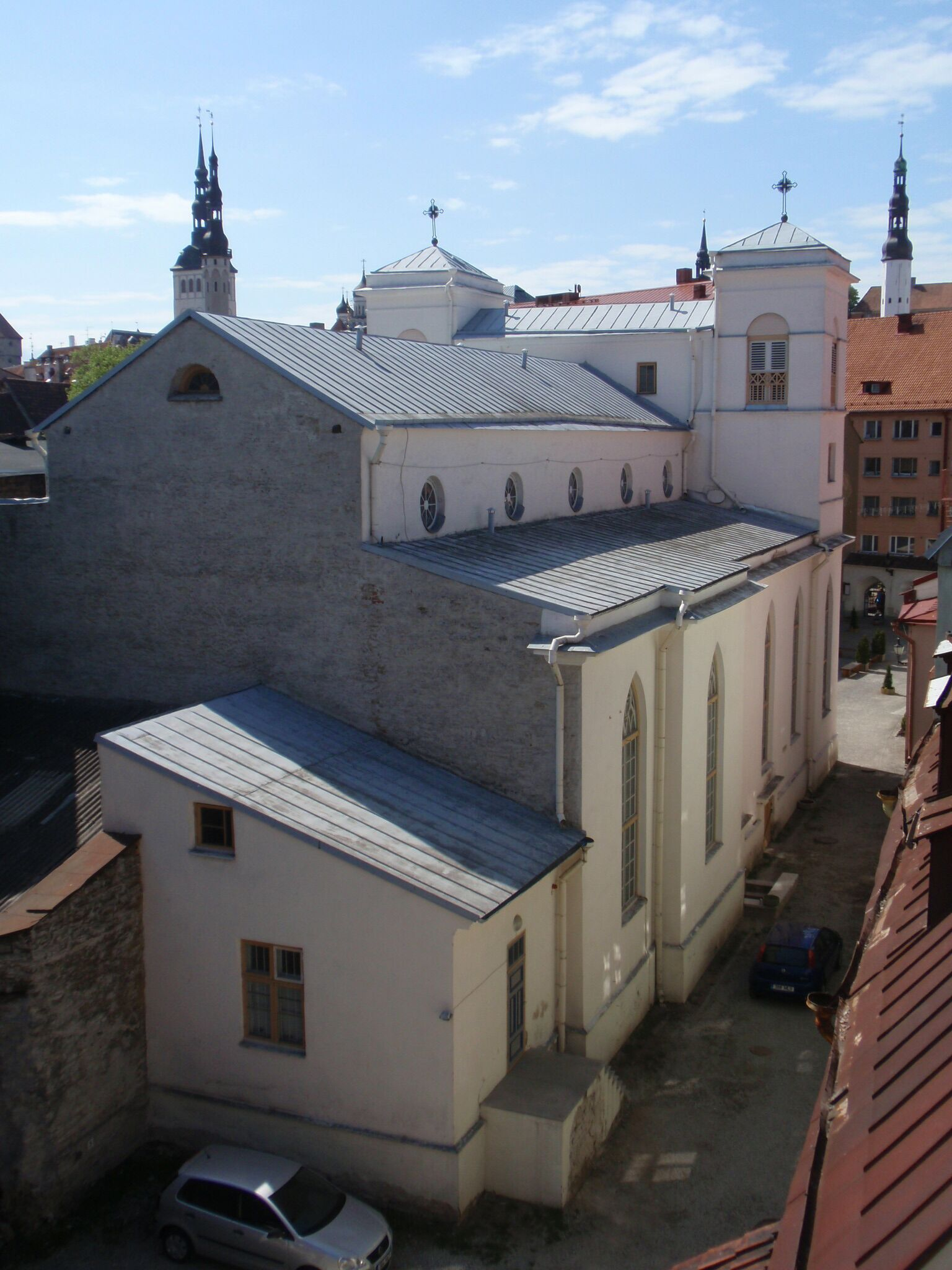 Tallinna Peeter-Pauli kirik tagantpoolt.